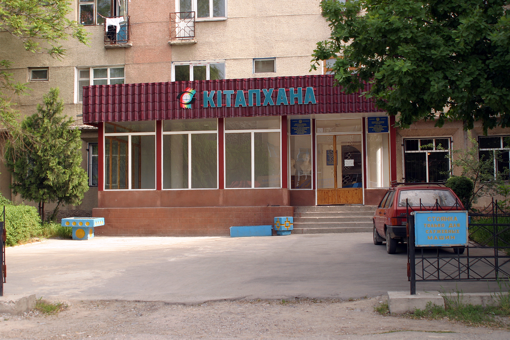 Оңтүстік Қазақстан облыстық көзі көрмейтін және әлсіз көретін азаматтарға арналған арнайы кітапхана